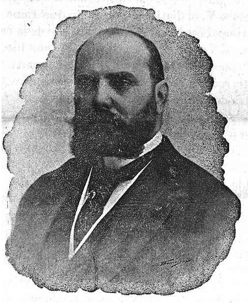 Político tradicionalista